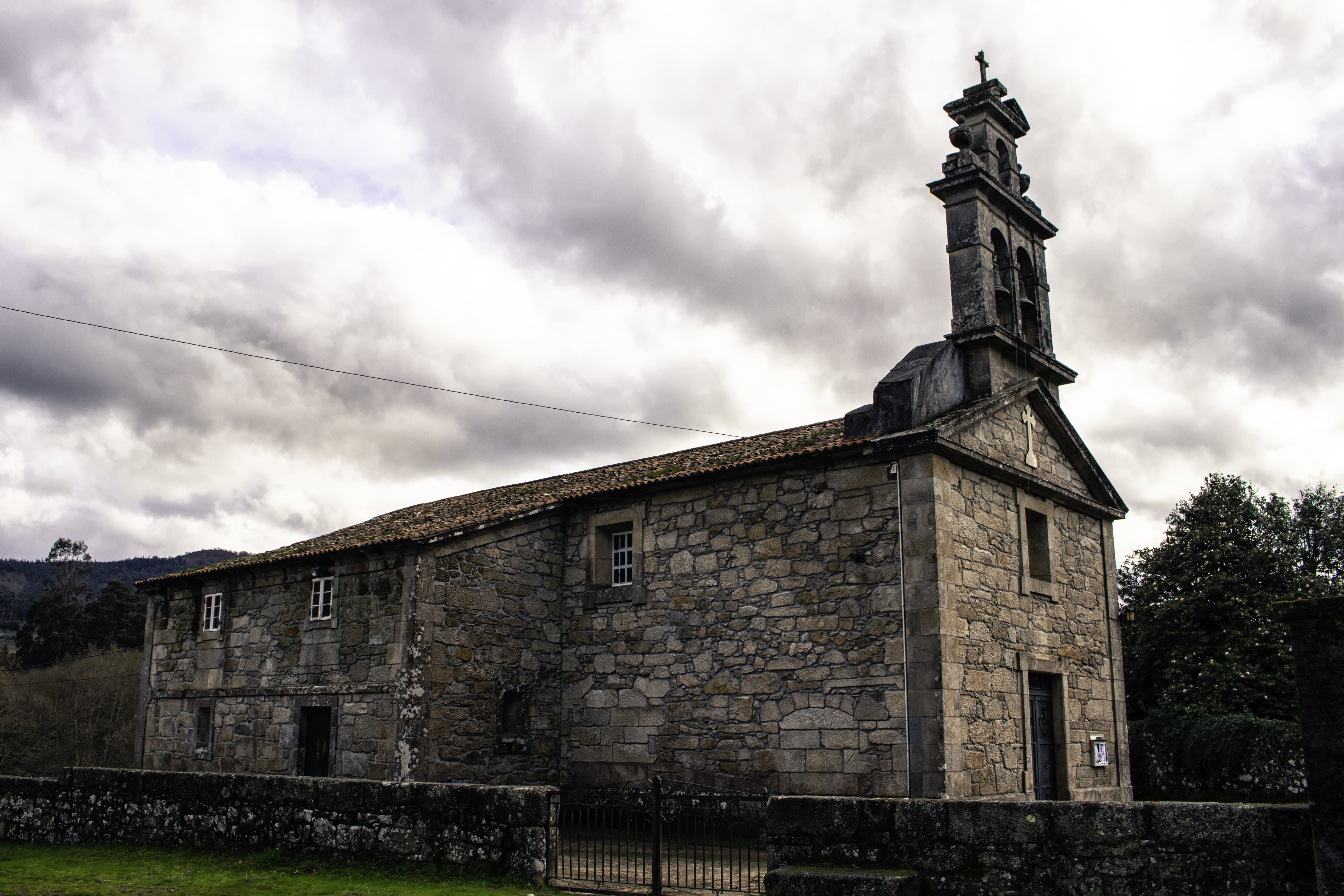 Igrexa de San Lourenzo de Moraña.